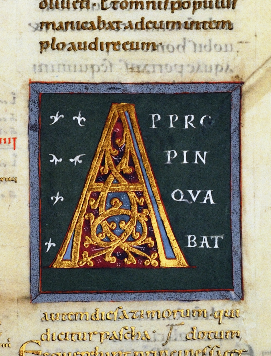 Codex Aureus Epternacensis.